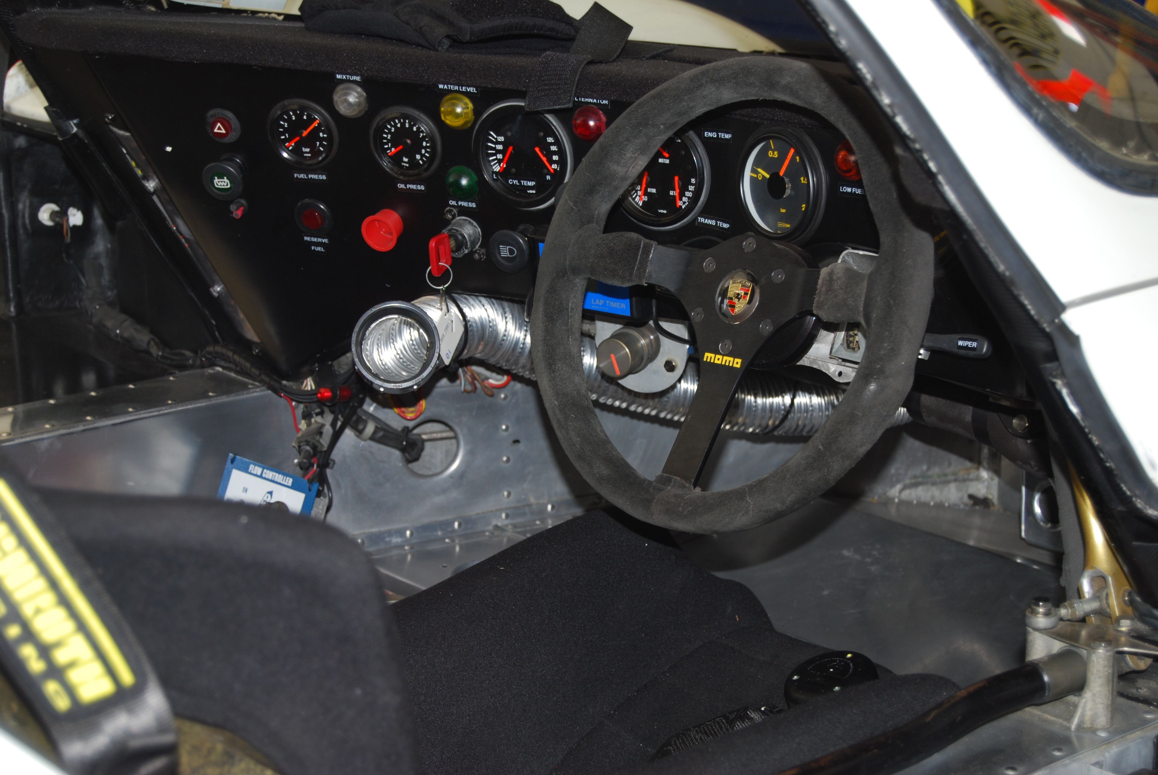 6f10_DSC_0522